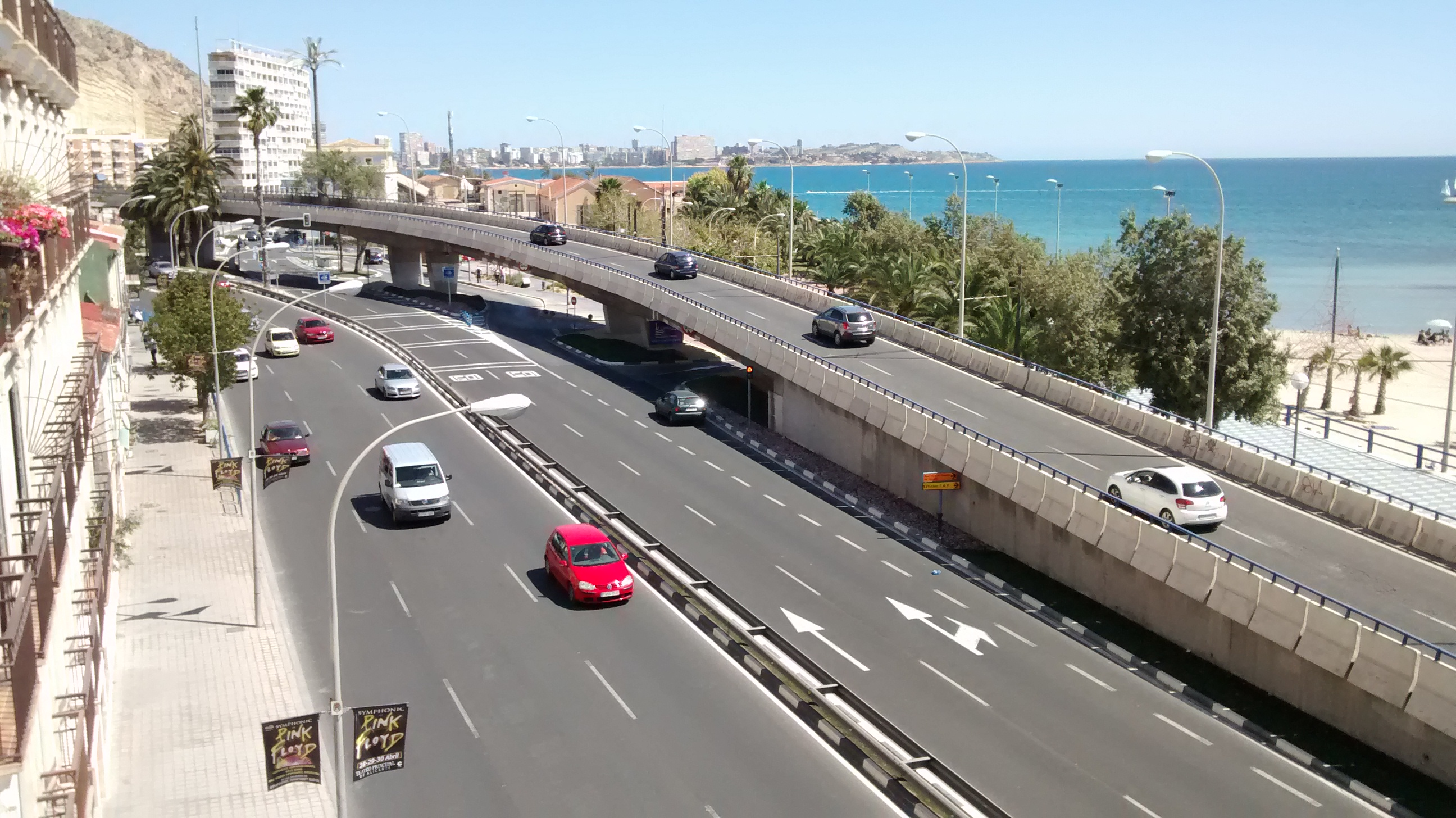 Scalextric del Postiguet (sur)